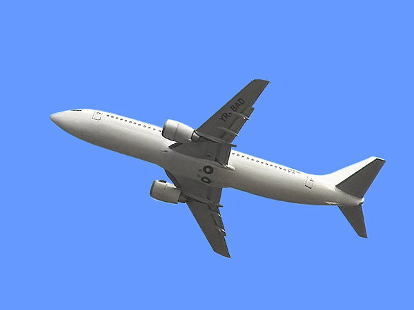 Blue Air YR-BAD (Boeing 737-4C9), noch ohne Firmenfarben, Fotografiert mit einer Rollei dk4010 (57mm) am Flughafen Köln/Bonn